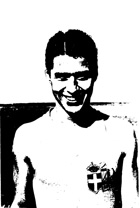 Il velocista italiano Orazio Mariani.